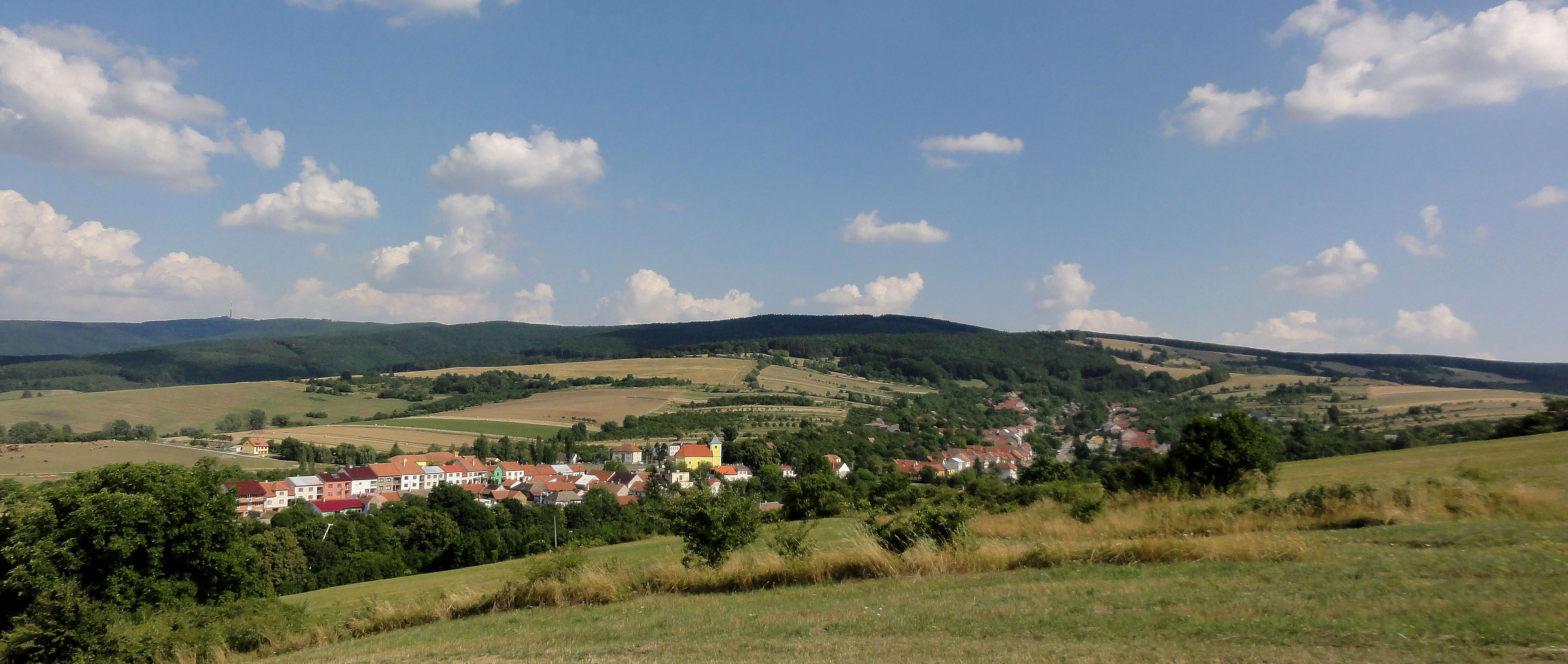 Pohled na obec od západu